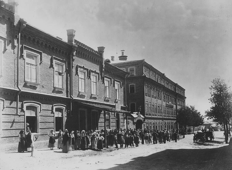 Старый Ростов-на-Дону. Здание фабрики Асмолова